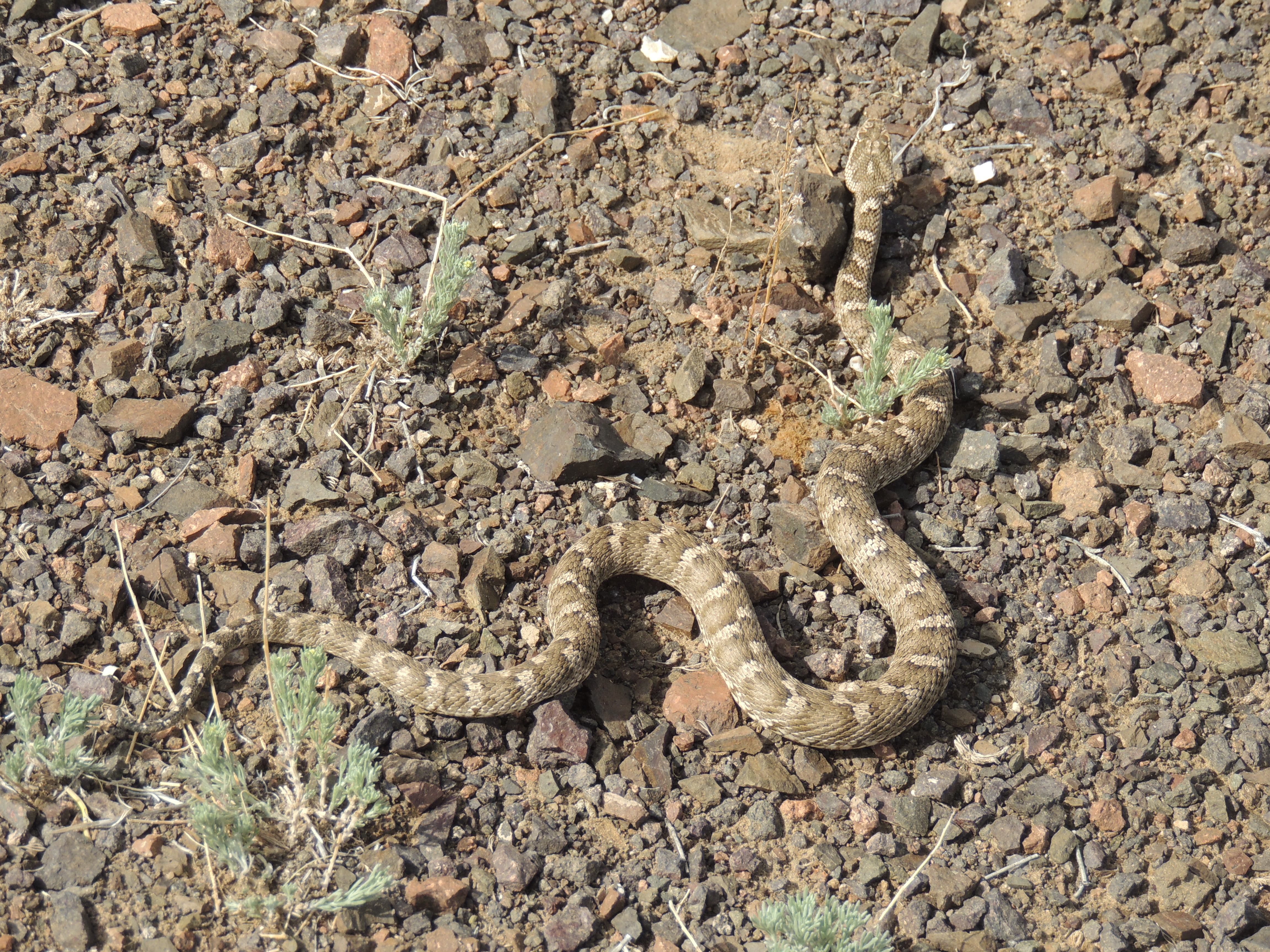 Щитомордник на горе Тост-Ула в Монголии